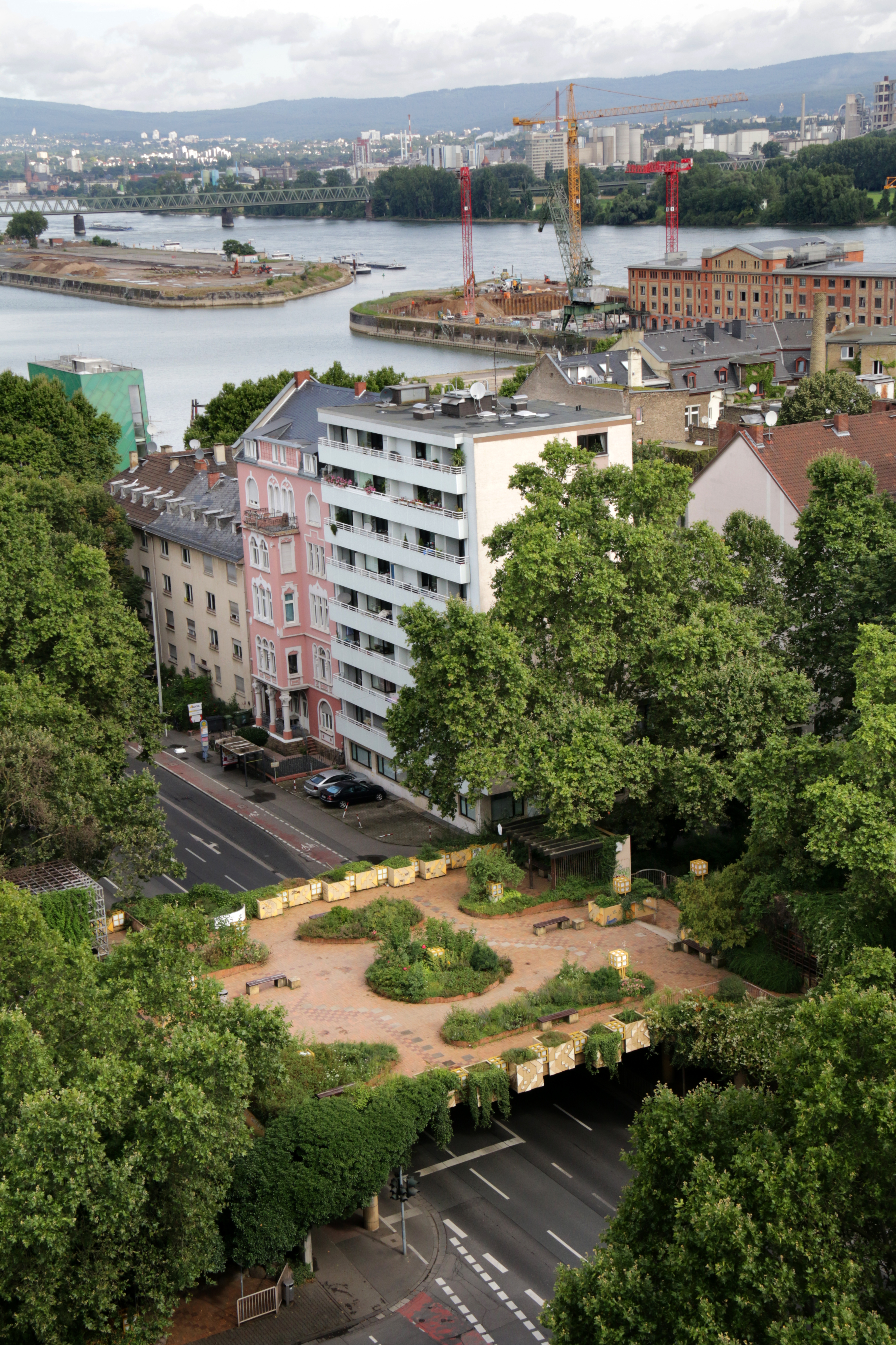 Blick auf "die Grüne Brücke" des Umweltkünstlers Dieter Magnus, die die Rheinallee überspannt. Im Hintergrund der Mainzer Zollhafen. Aufgenommen von Hochhaus der Stadtwerke